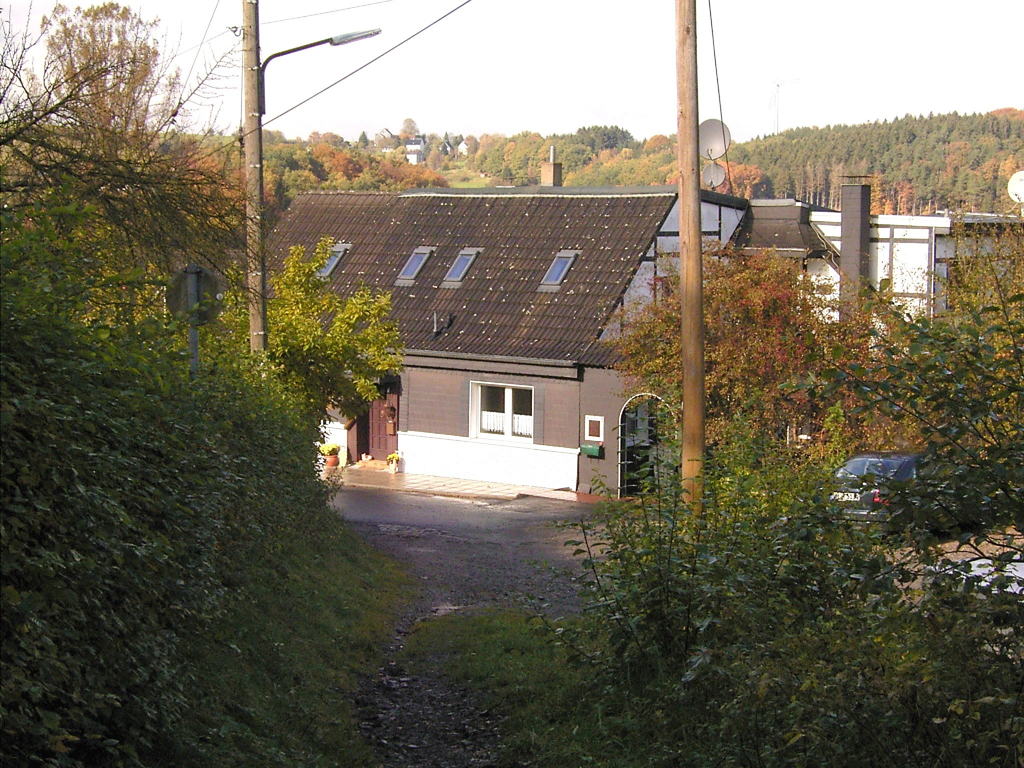 Radevormwald